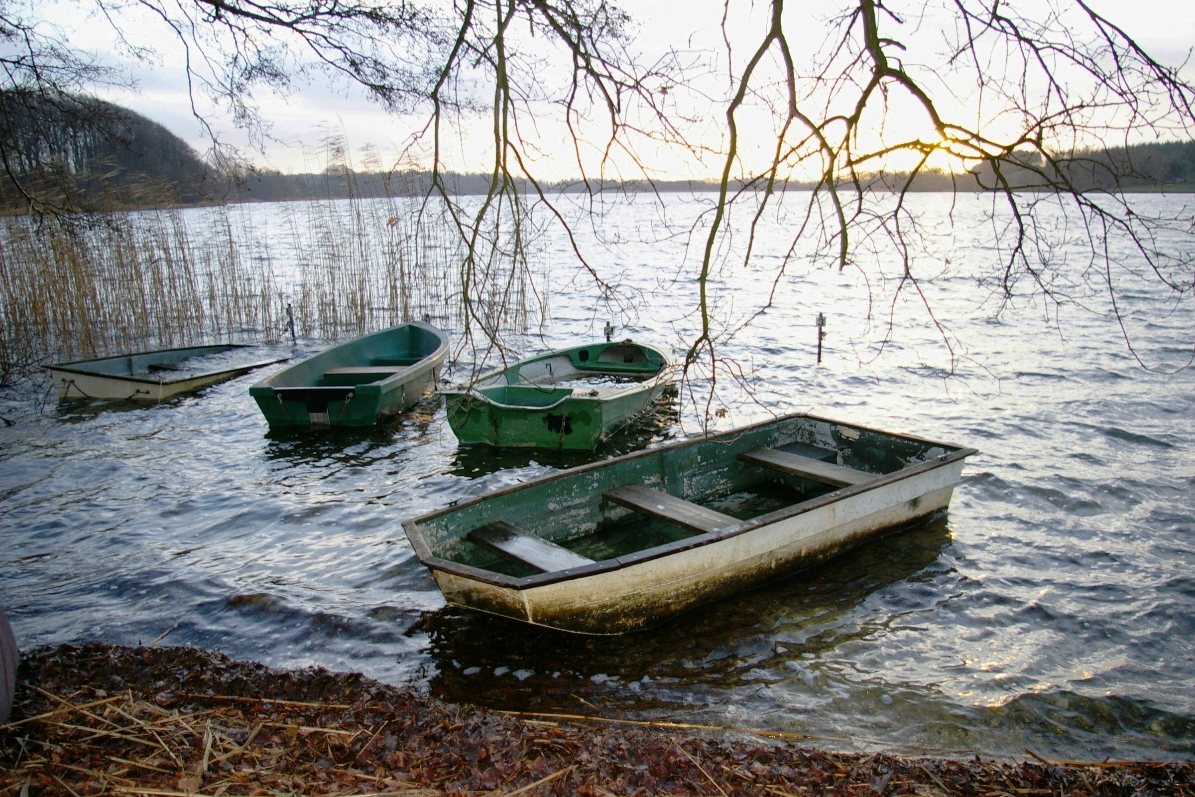 Großer Pohlsee, Nordufer